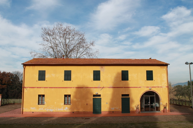 Foto scattata alla Casa Colonica di Villa Carmignani